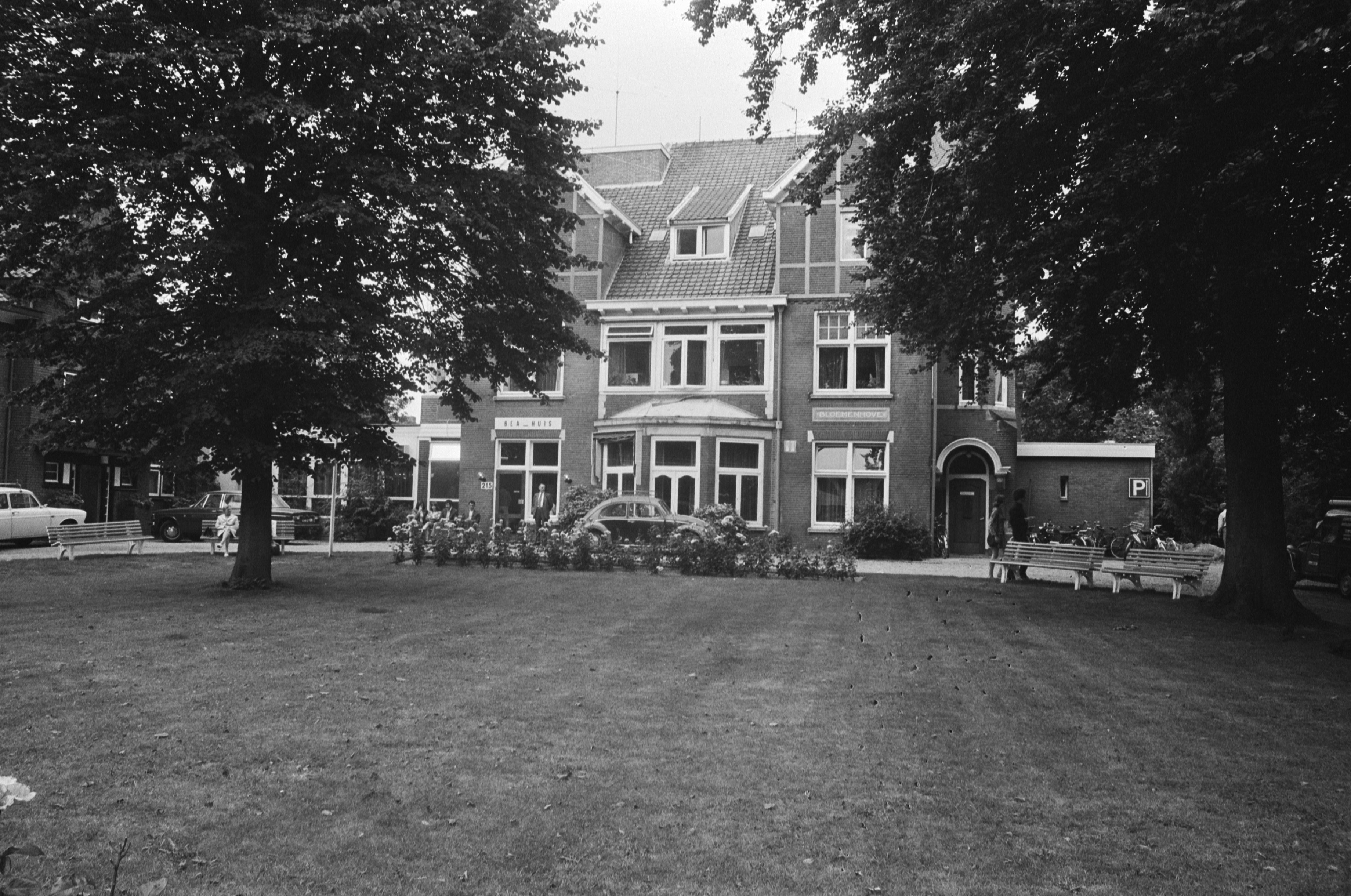 Voor- en tegenstanders van abortus demonstreren voor het Bea-huis (Bloemenhovekliniek) in Heemstede; exterieur kliniek Bloemenhove (NL-HaNA 2.24.01.05 0 927-3592)